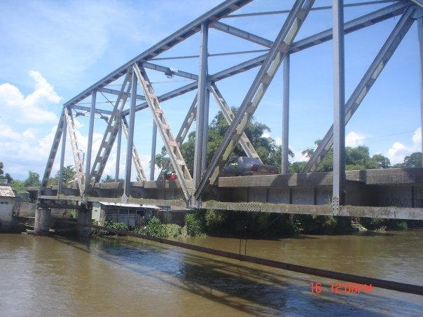 Puente sobre el Rio Fundacion